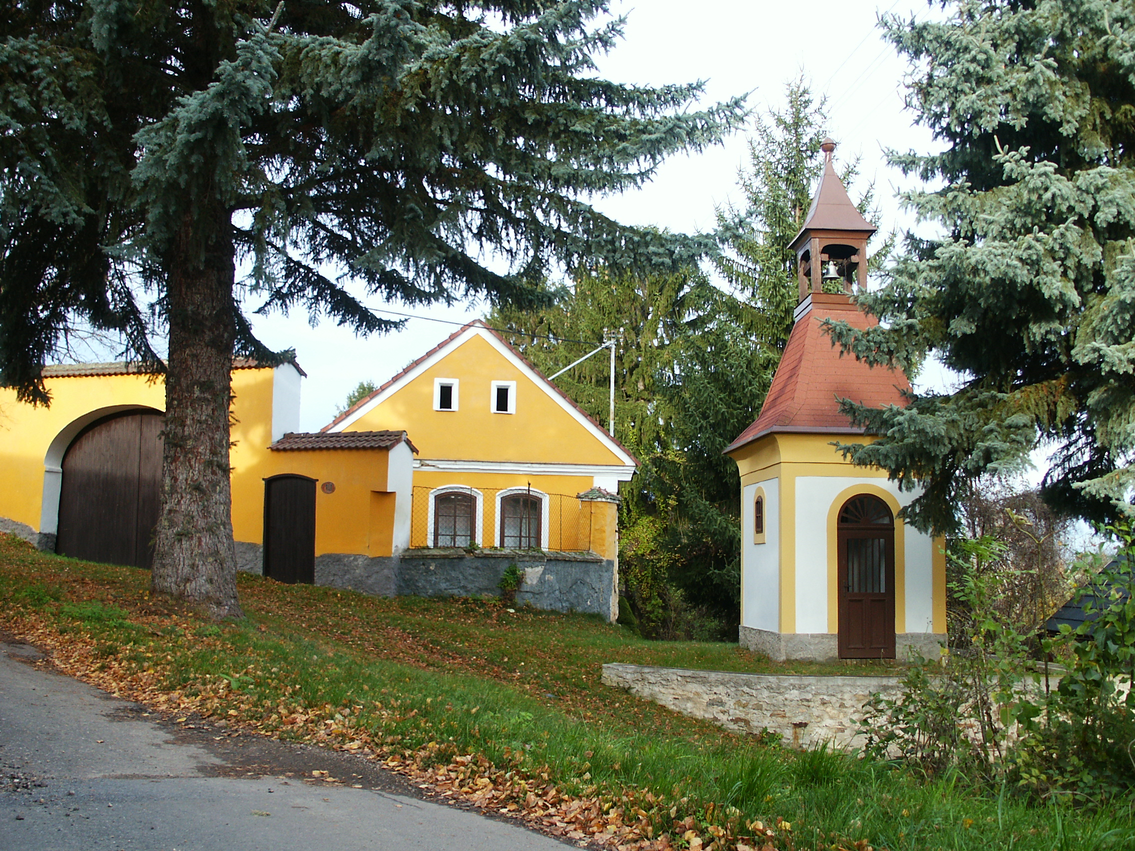 Hořany - zvonička, č.p. 10